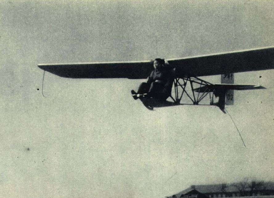 1962-07 1962年 弹射式滑翔机